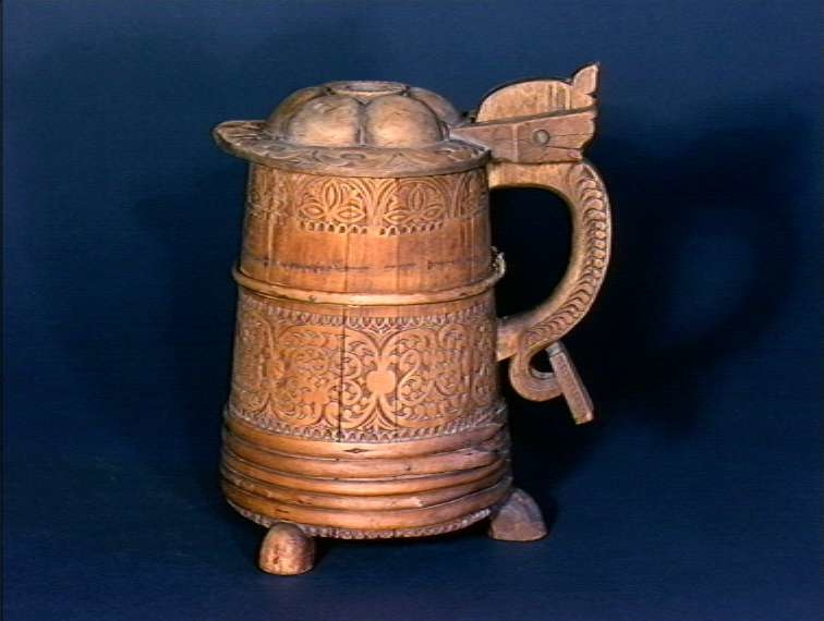 Lagget drikkekanne fra Lesja. Høyde 25,5 cm. Norsk Folkemuseum. NF.1992-2905.